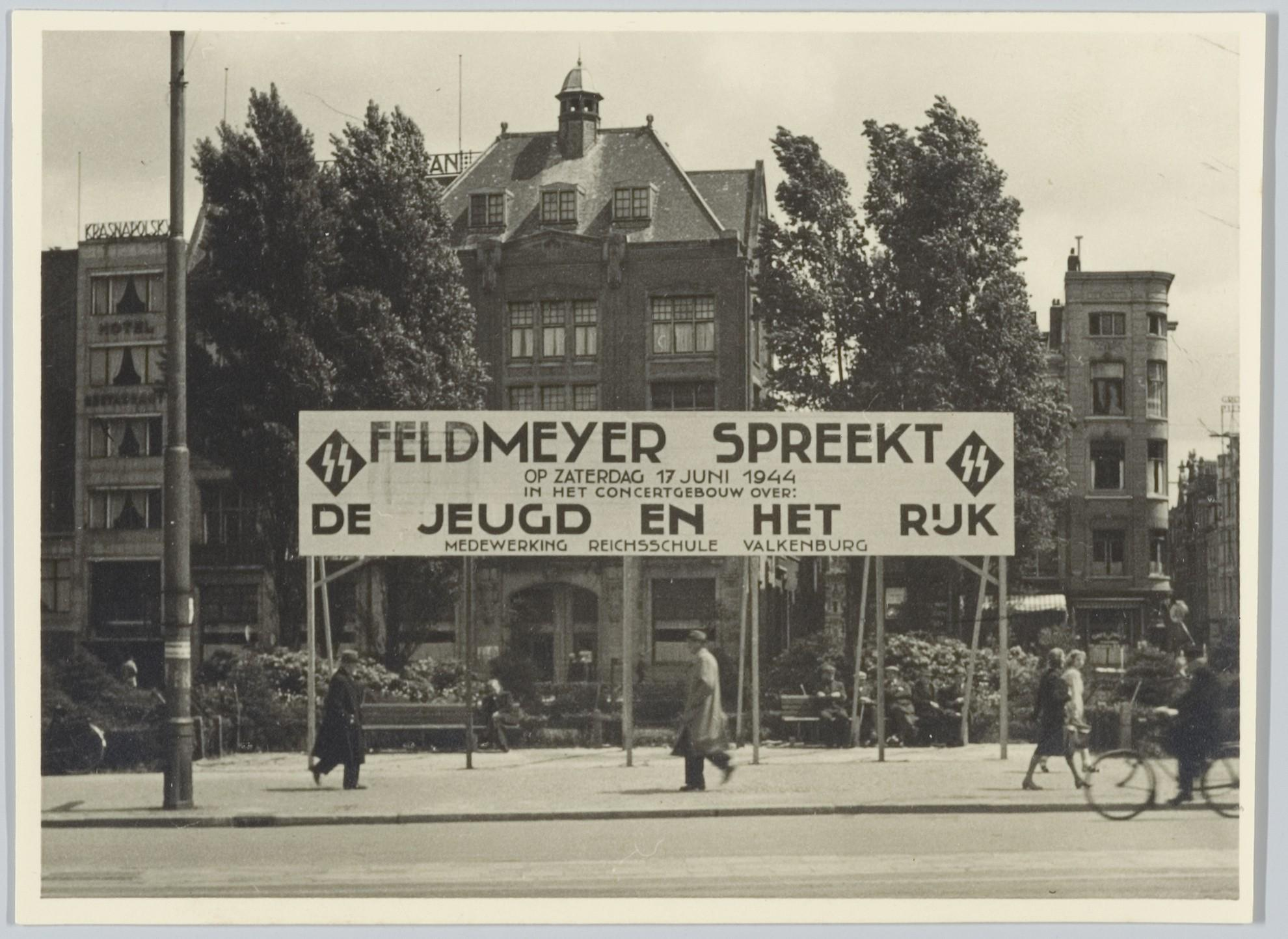 Beschrijving Aankondiging op de Dam van een redevoering door J.H. Feldmeyer Mede-oprichter van de jeugdorganisatie van de NSB ('Mussert-Garde'), op zaterdag 17 juni 1944. Documenttype foto Vervaardiger Onbekend Anoniem Collectie Collectie Stadsarchief Amsterdam: foto-afdrukken Datering juni 1944 Geografische naam Dam Inventarissen Afbeeldingsbestand ANWE00219000001